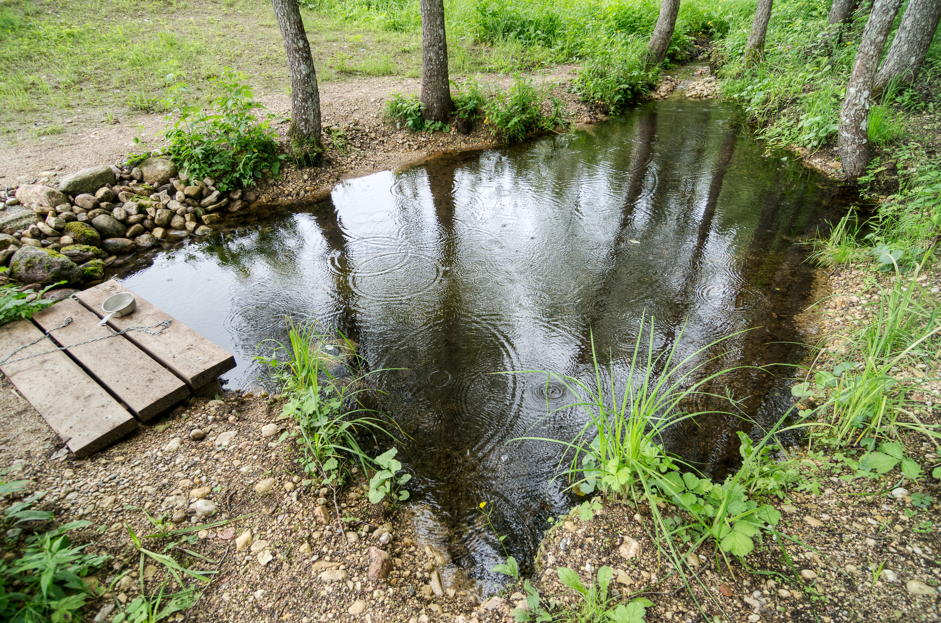 Allikas Arula Emaläte